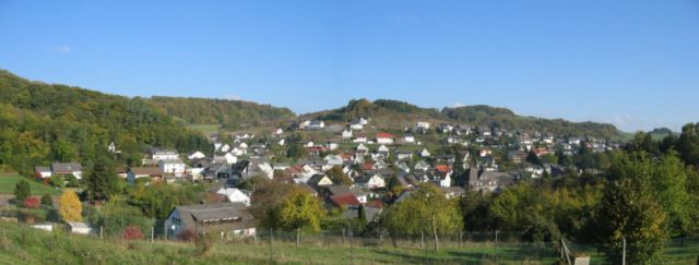 Erdbach vom Schönbacher Weg, Nutzung für jedermann frei verfügbar